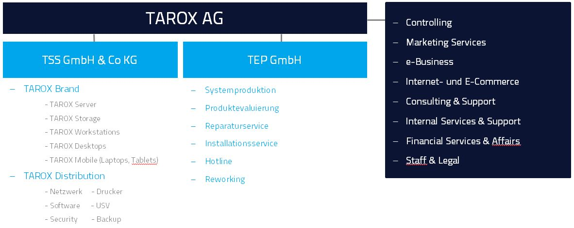 TAROX Organisation